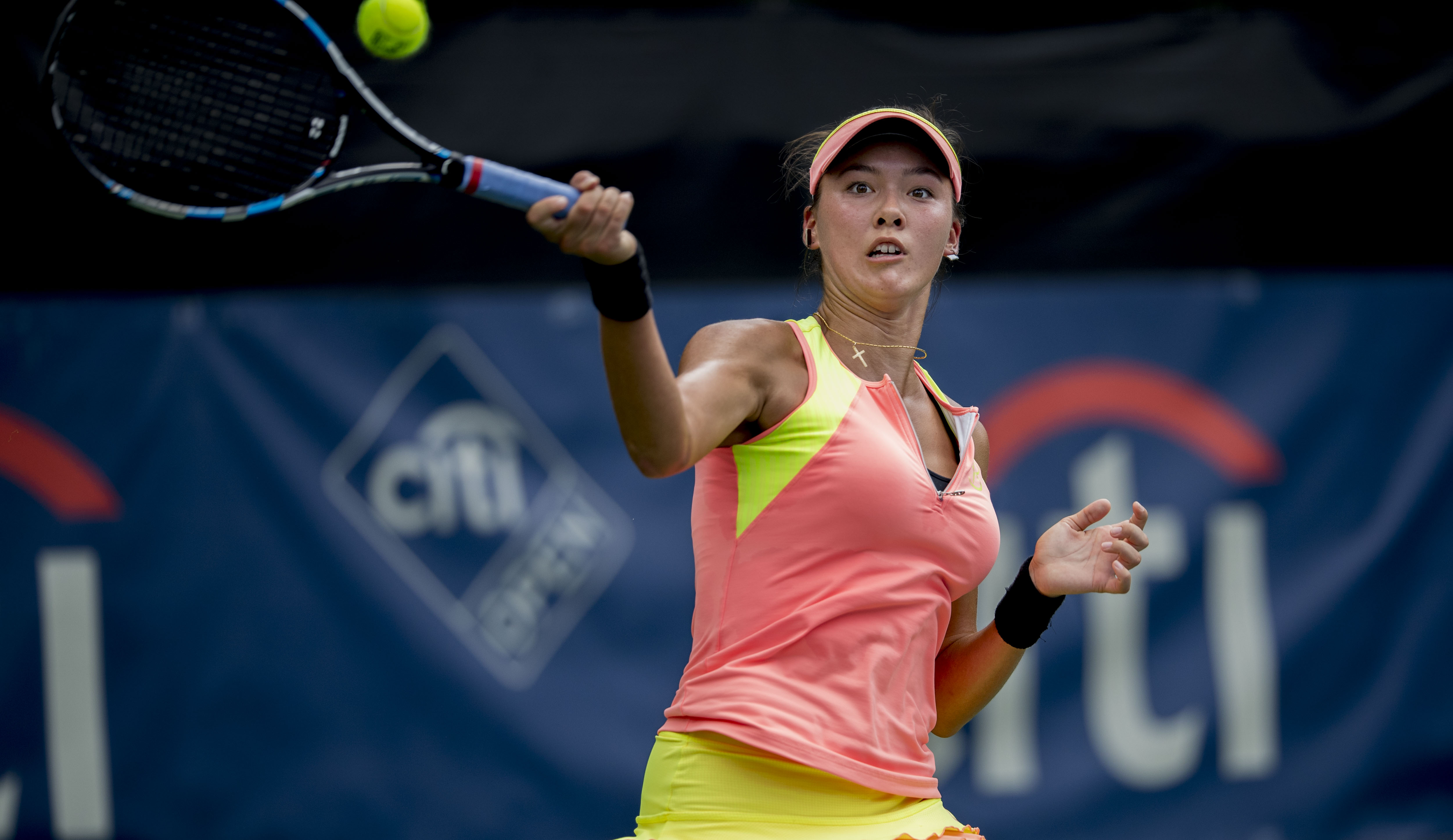 Citi Open Tennis 2017